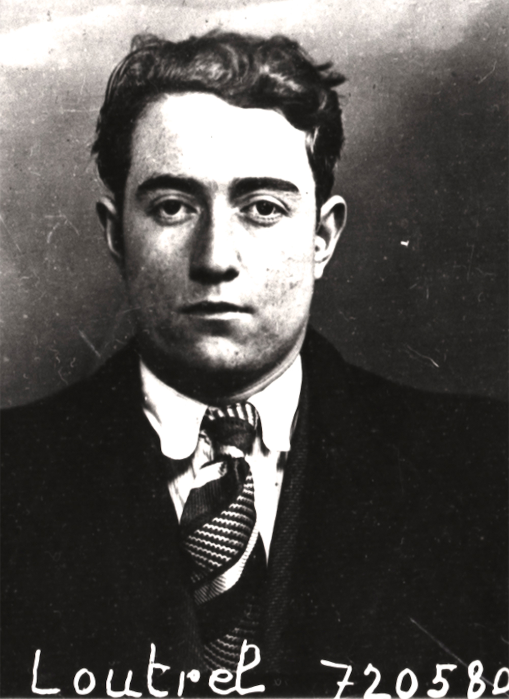 Photographie d'identité judiciaire de Pierre Loutrel, dit « Pierrot le fou ».